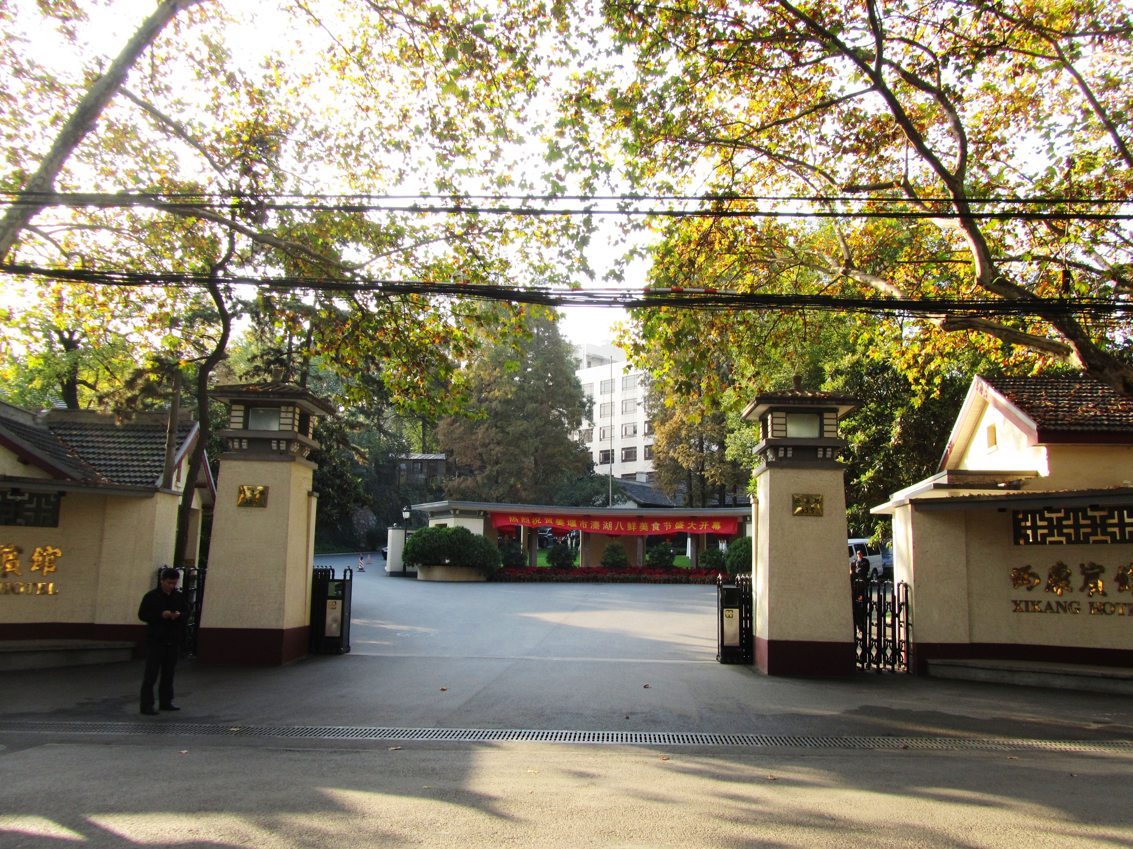 南京西康路原美国驻中华民国大使馆大门，今西康宾馆。